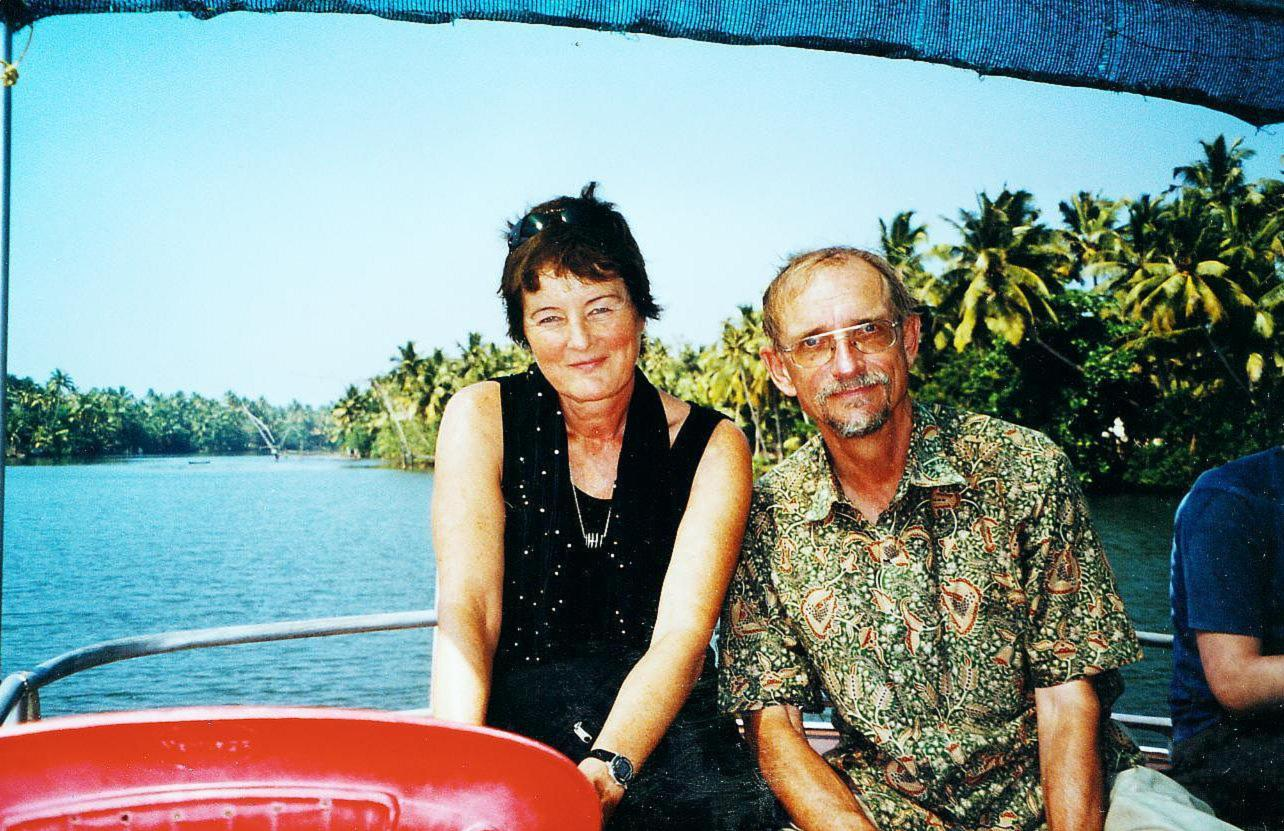 Rüdiger und Margarete Siebert in einem Boot für den öffentlichen Nahverkehr in der indischen Provinz Kerala (2007)